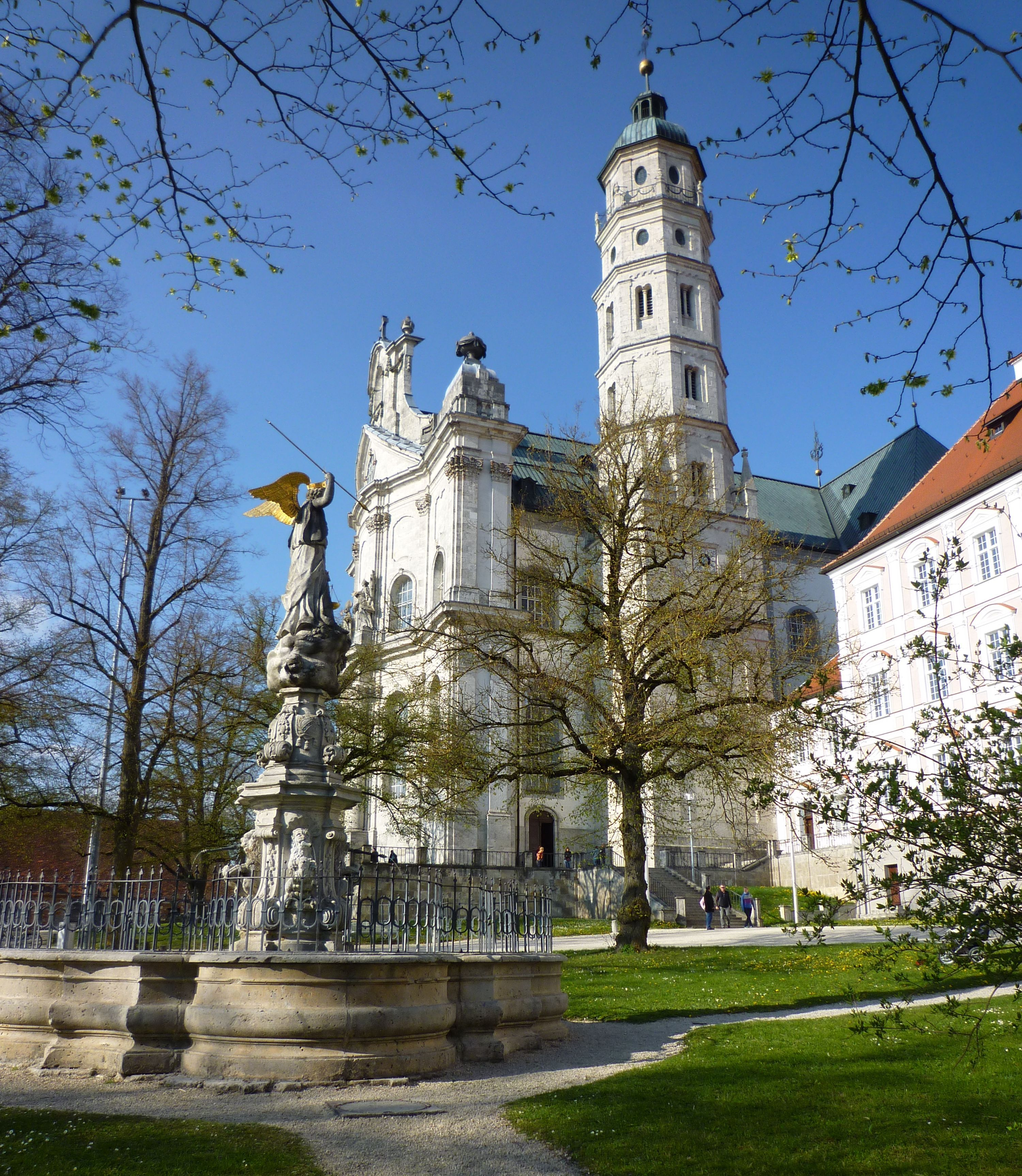 Neresheim -Abtei über der Stadt02